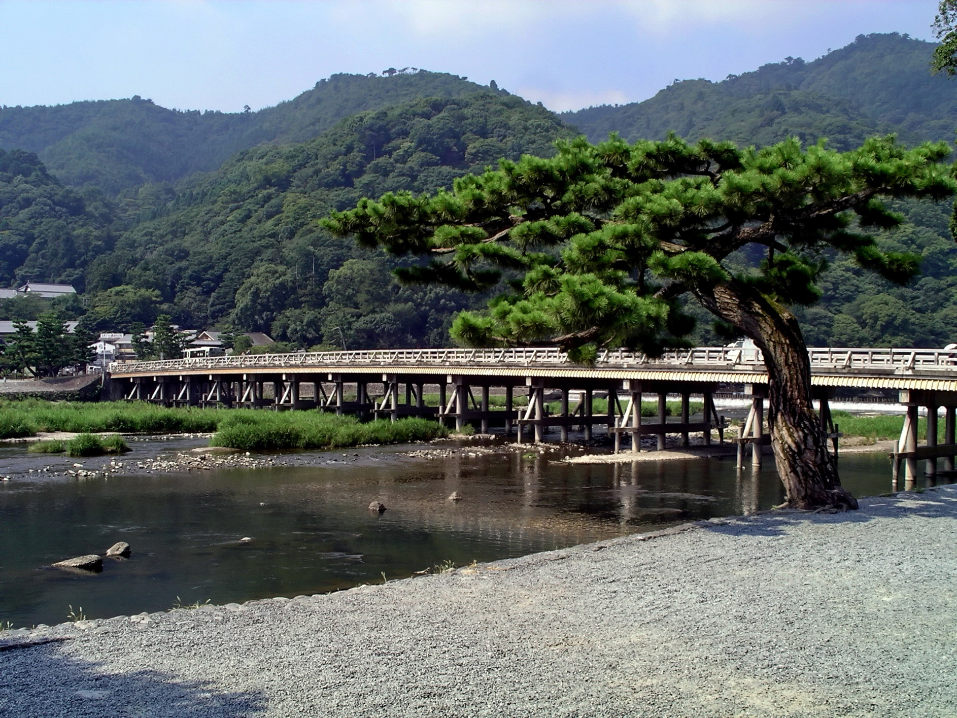 Togetsukyo Bridge in Arashiyama, Kyoto.